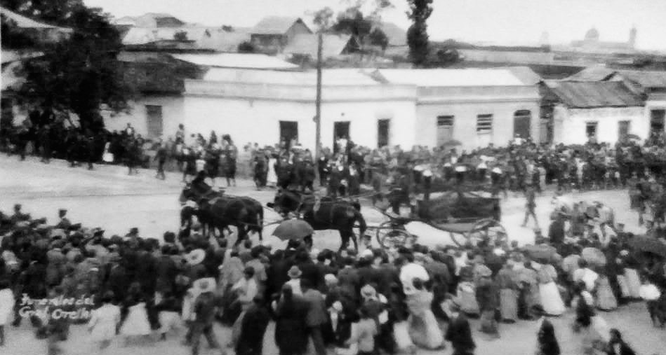 Sepelio del general José María Orellana. 1926